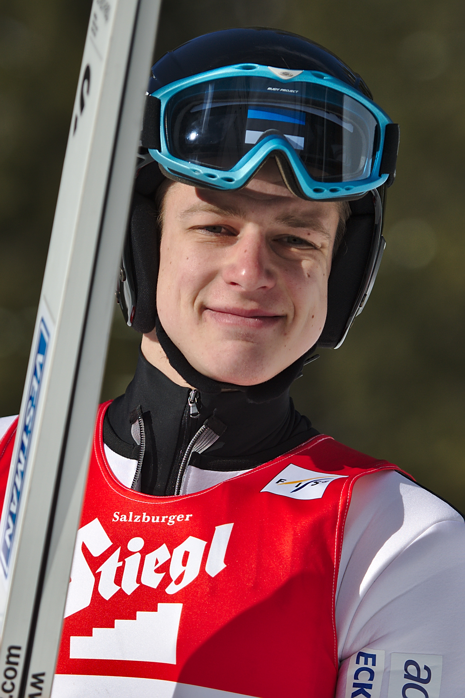 Han Hendrik Piho in Eisenerz 2017